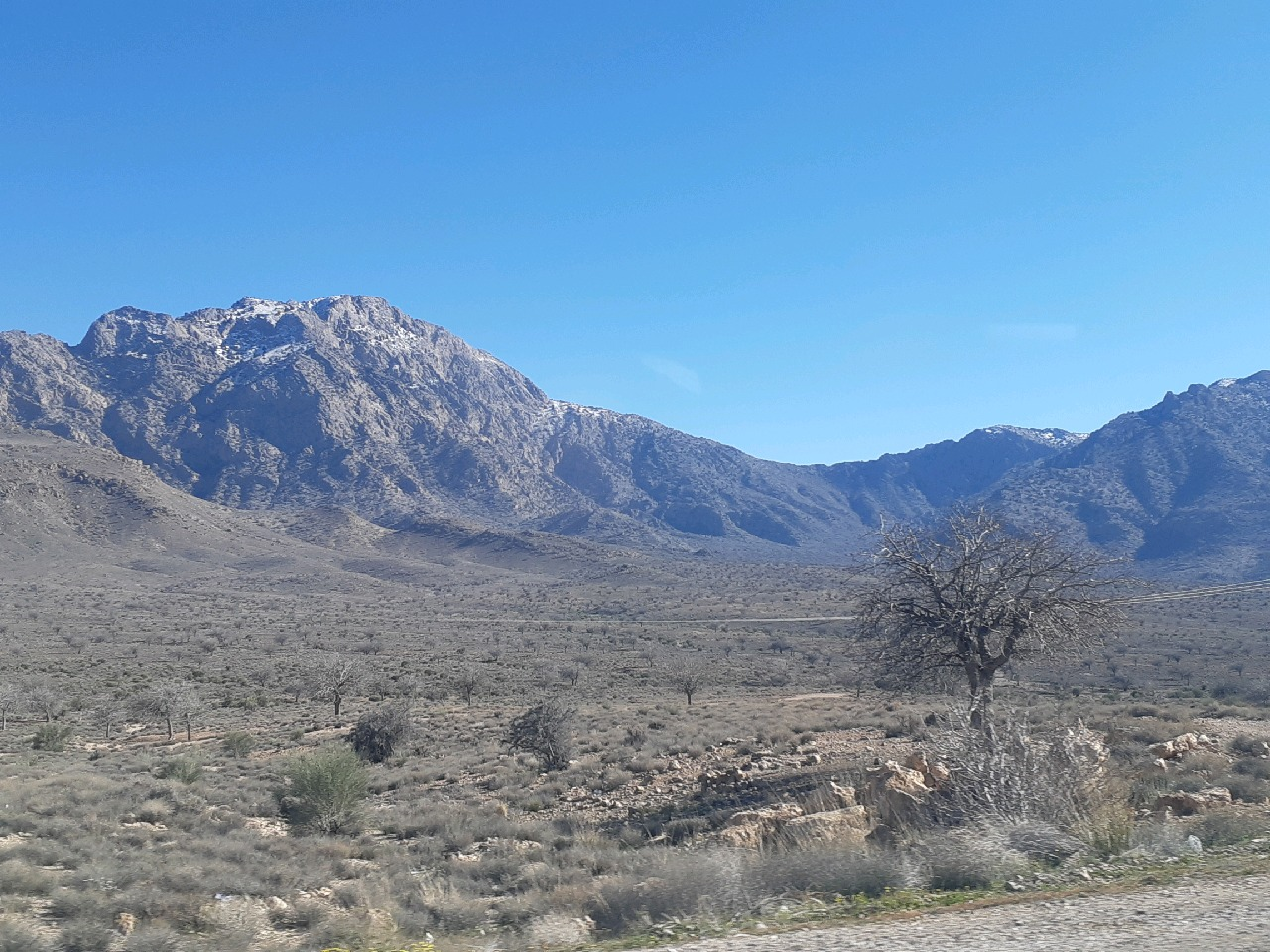 کوهستان های نواحی شمالی شهرستان ارزوئیه